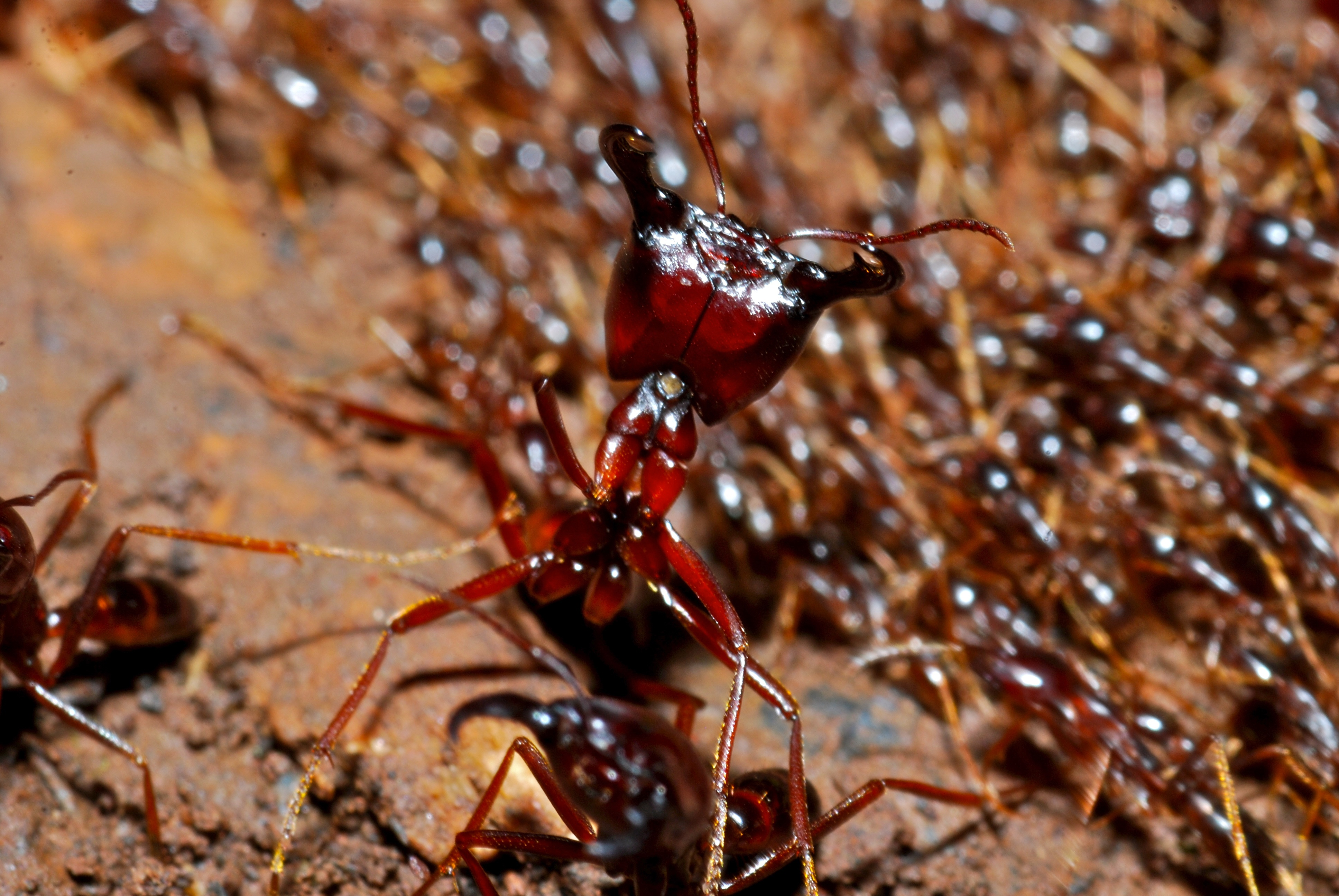 Mabira Forest, UGANDA